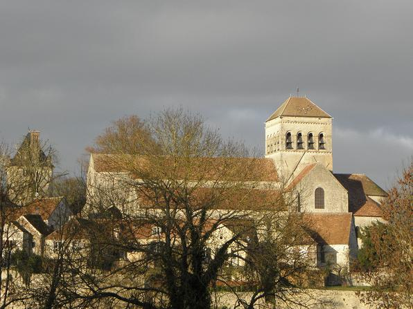 Village et prieurale de Saint-Loup-de-Naud (77).